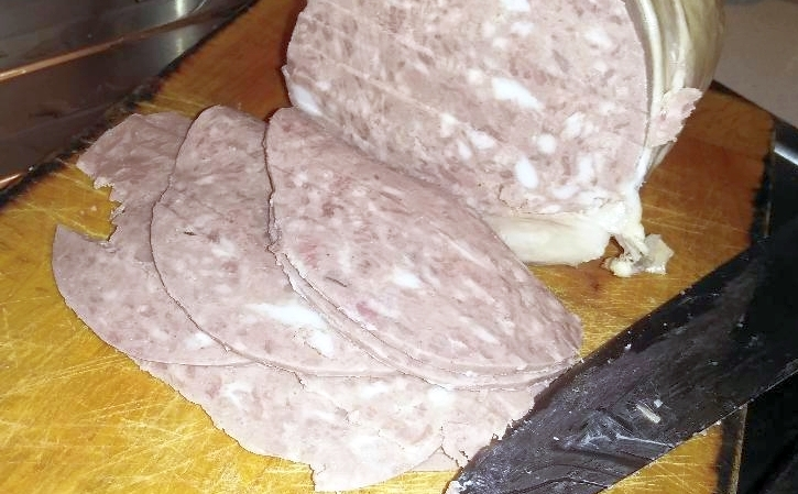 Mortadella di fegato cotta a fette